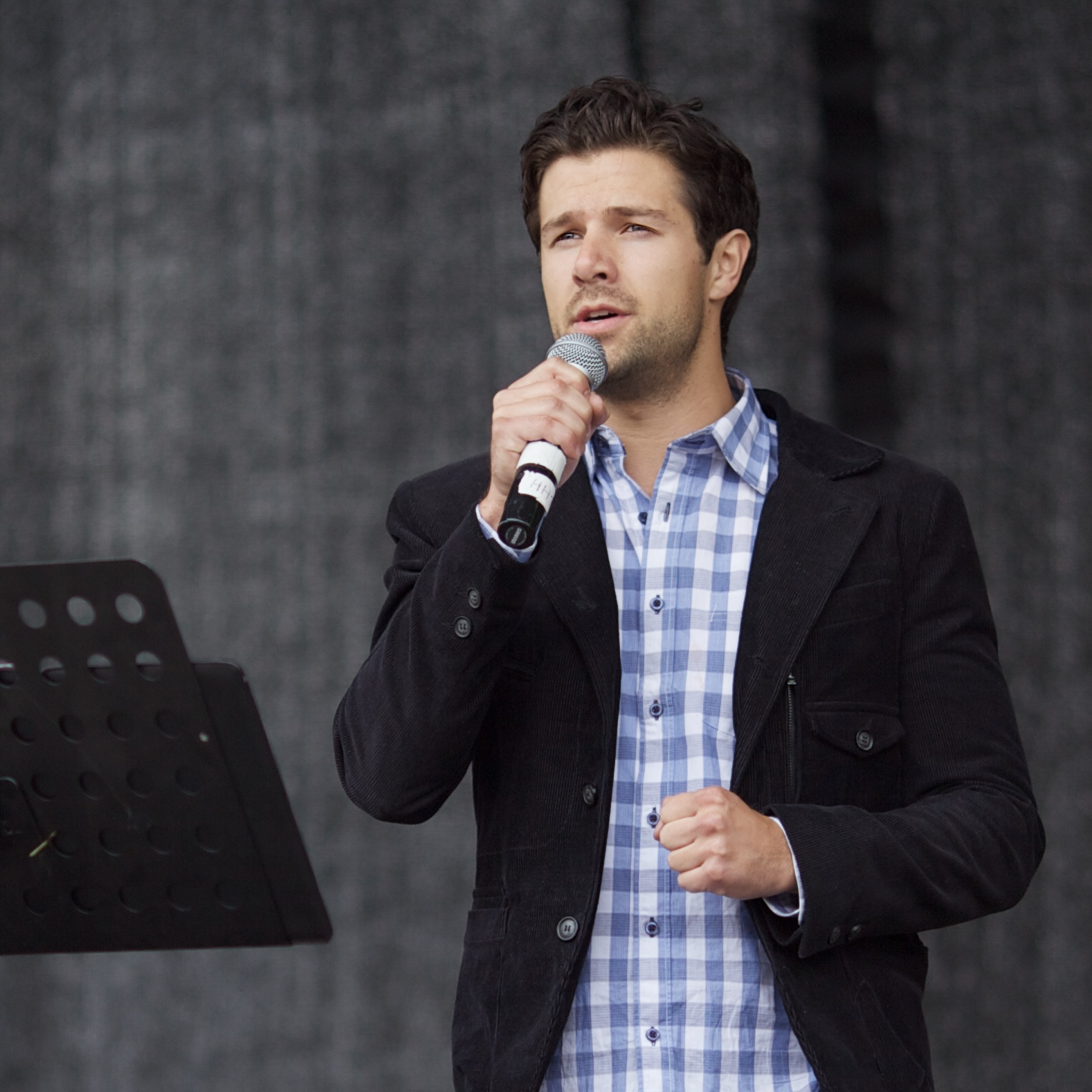 På Barnas dag i Porsgrunn